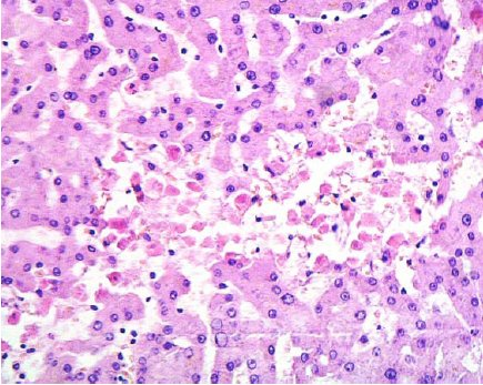 Necrosis centrilobularis hepatis